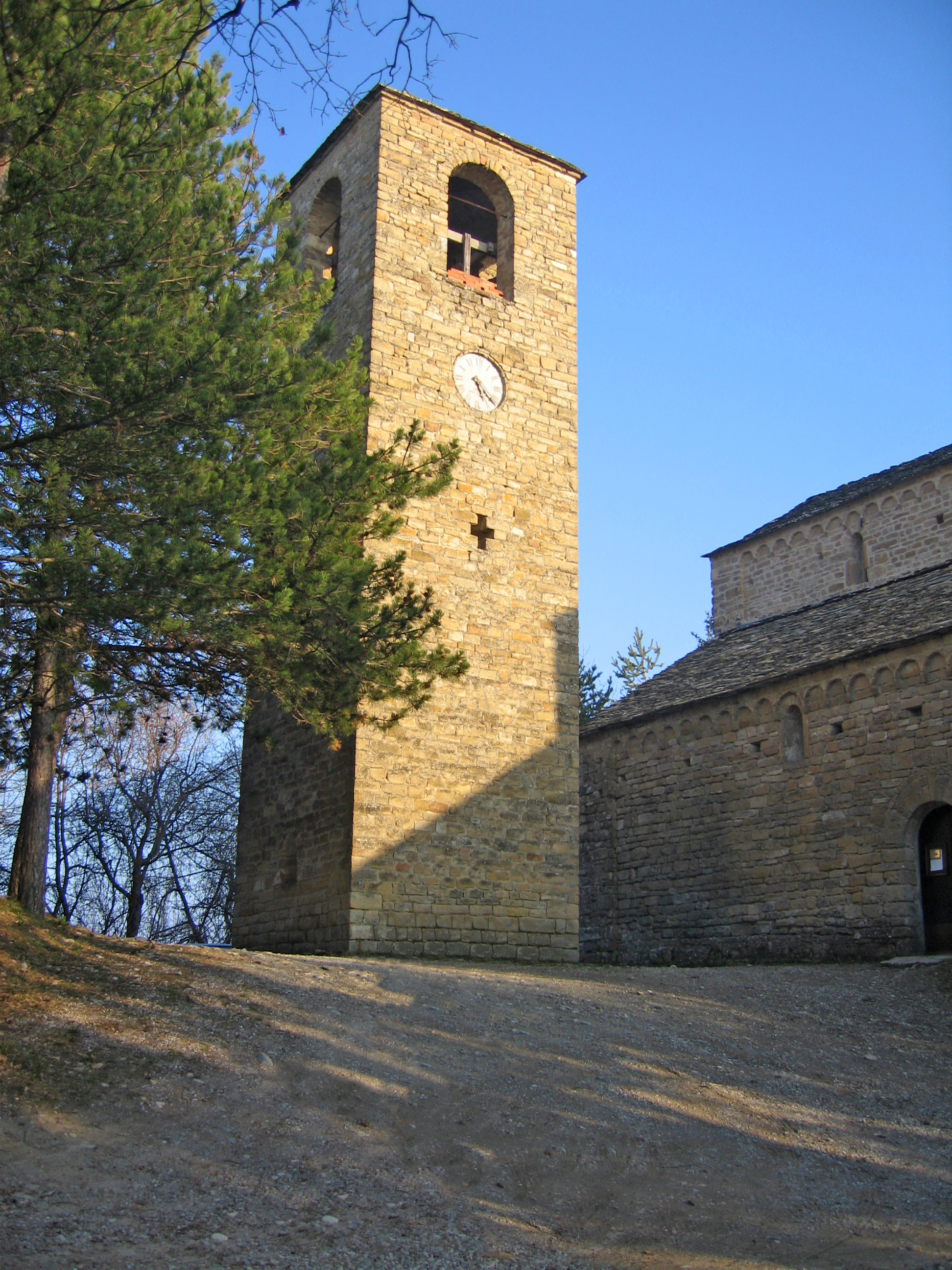 Pieve di Sasso (campanile)